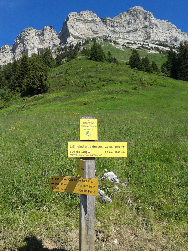 Le sentier part sur la droite qq mètres au-dessus